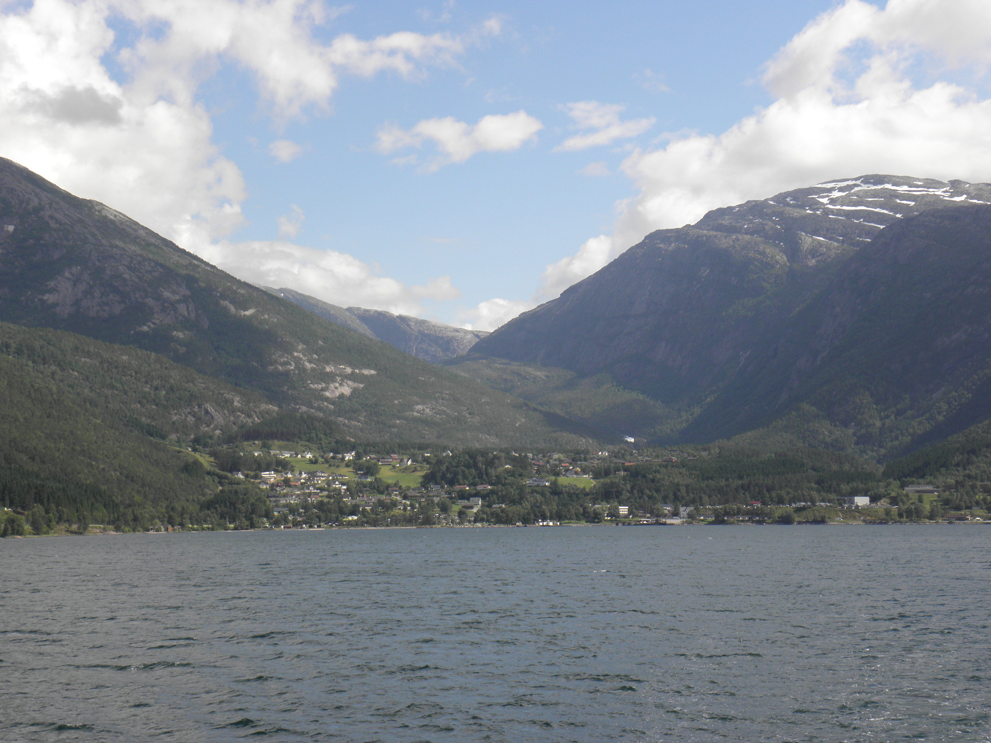 Tettstaden Kinsarvik